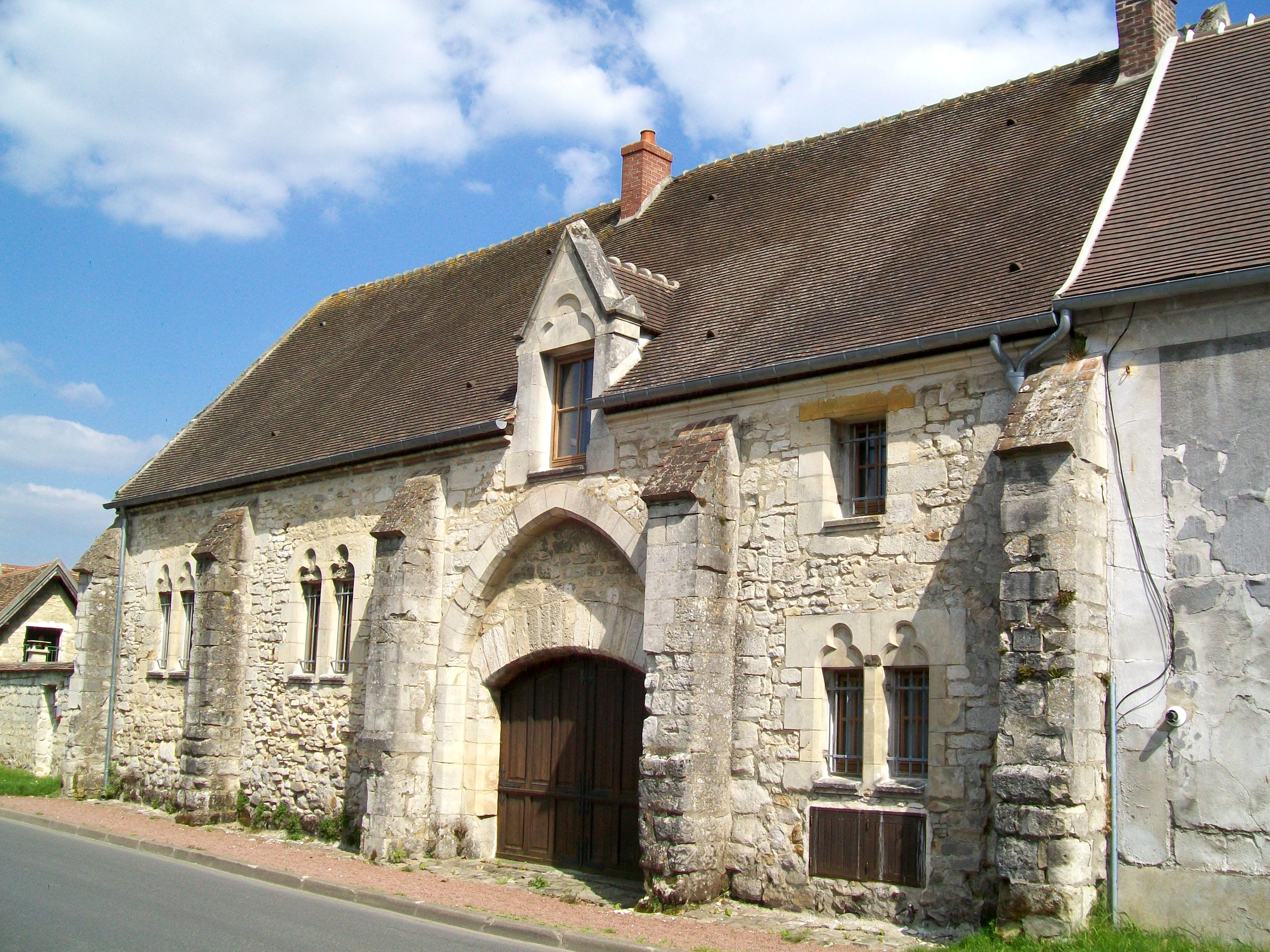 La maison Saint-Georges, ancienne dépendance de la grange de Commelles de l'abbaye de Chaalis, centre d'une exploitation agricole. L'abbaye de Chaalis avait racheté la ferme de l'abbaye Saint-Remy de Senlis en 1219. Cette abbaye de Bénédictines avait été fondée en 1040.